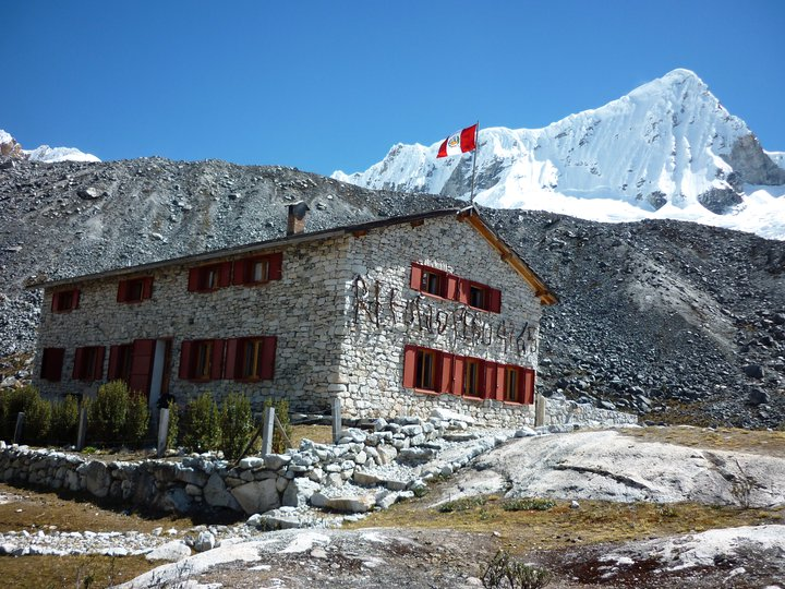 Refugio Perú a 4765 msnm.